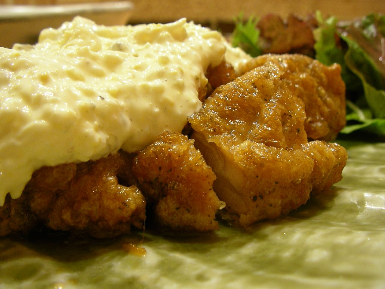 これが食べたかった! 宮崎のチキン南蛮